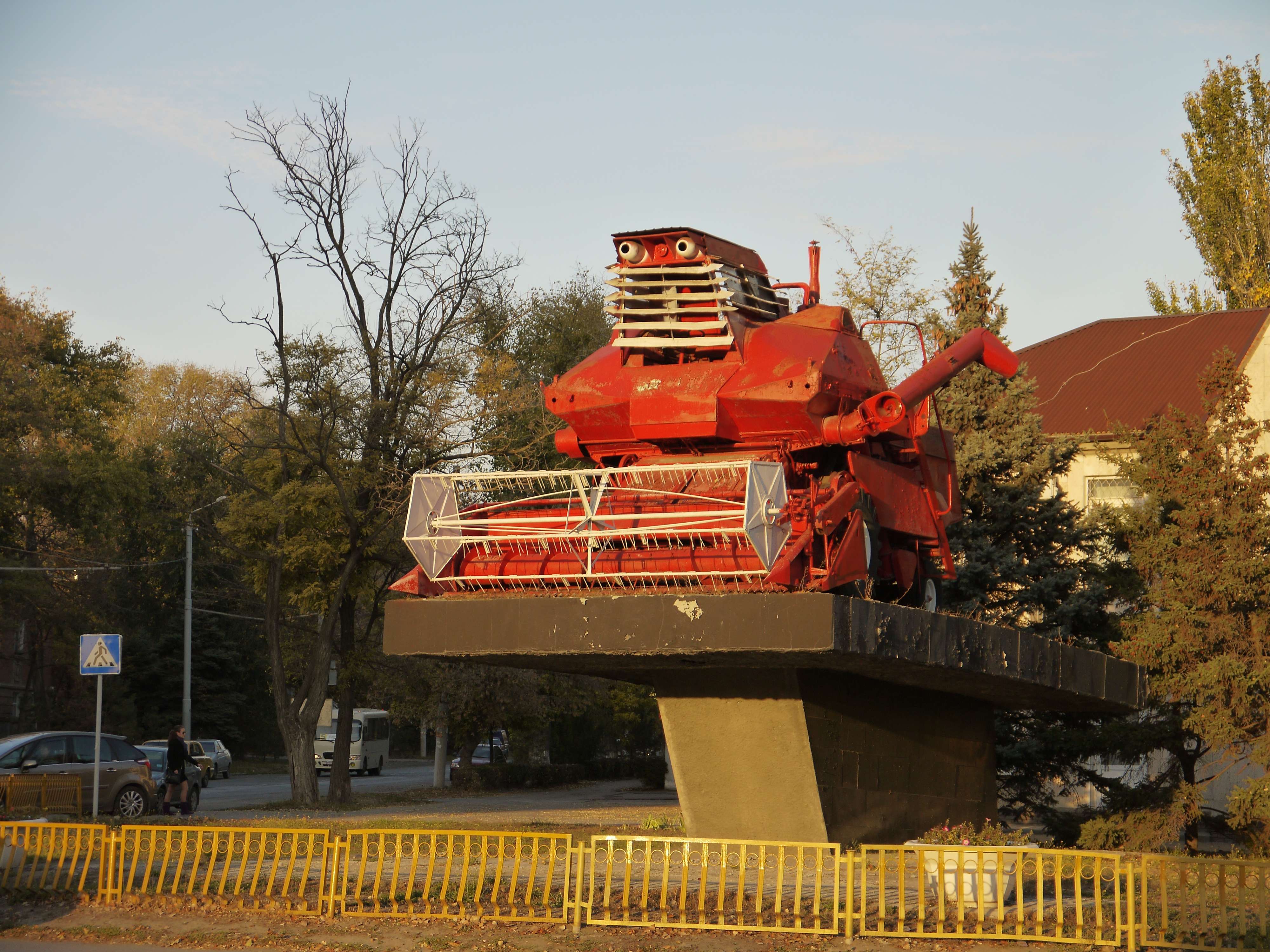 Таганрог, Комбайн «Колос»